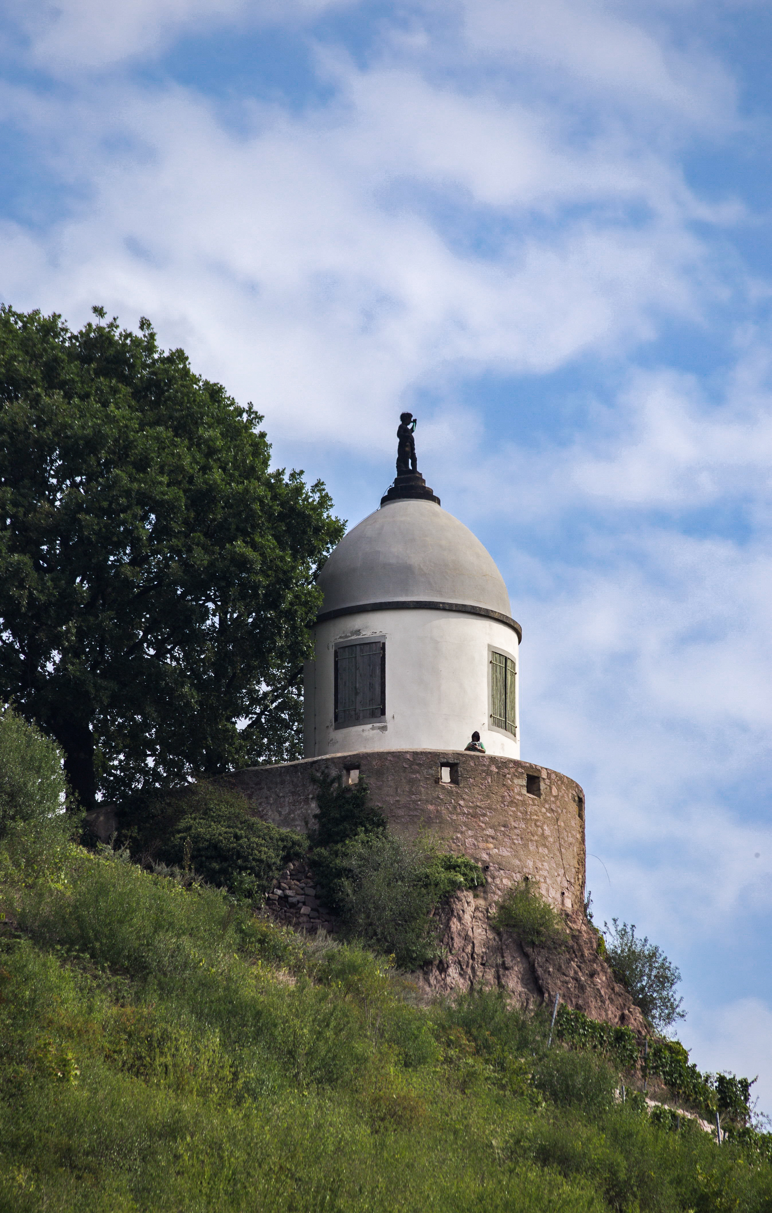 Radebeul, JacobsteinWackerbarthstraße 1Denkmalspflege: 9001-V